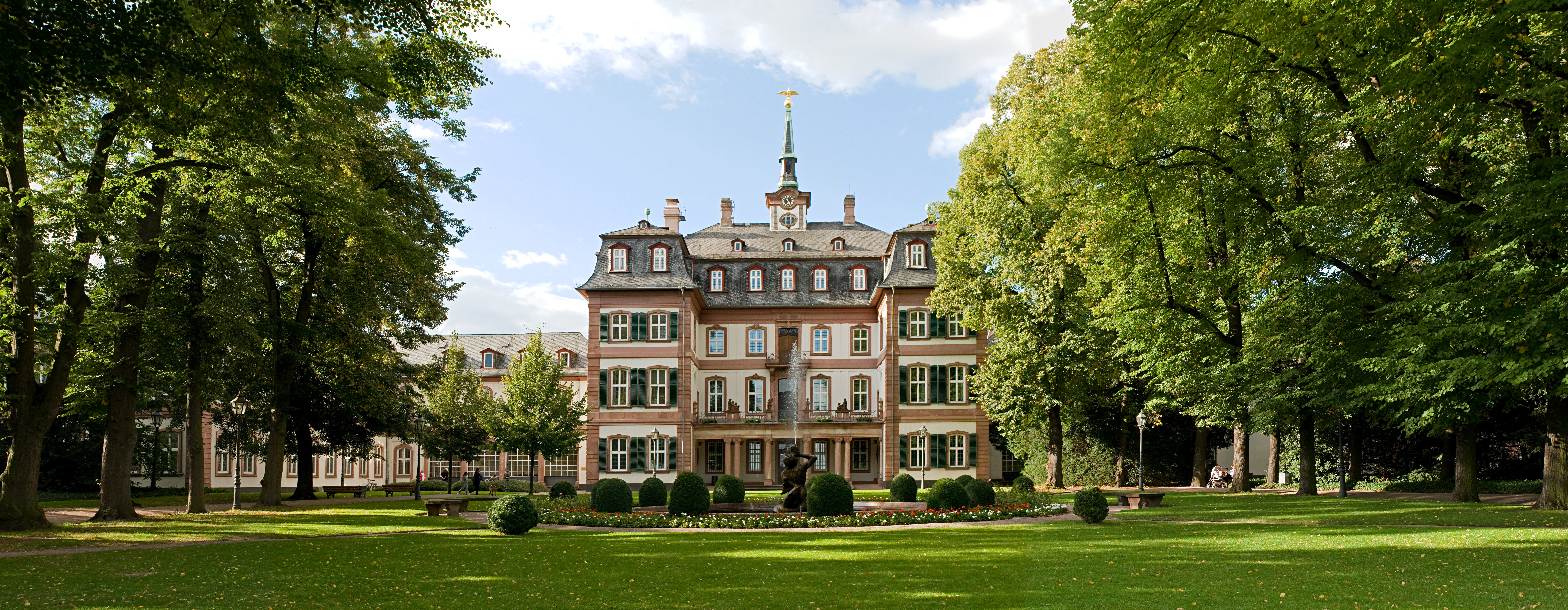 Panorama Bolongarogarten und Bolongaropalast